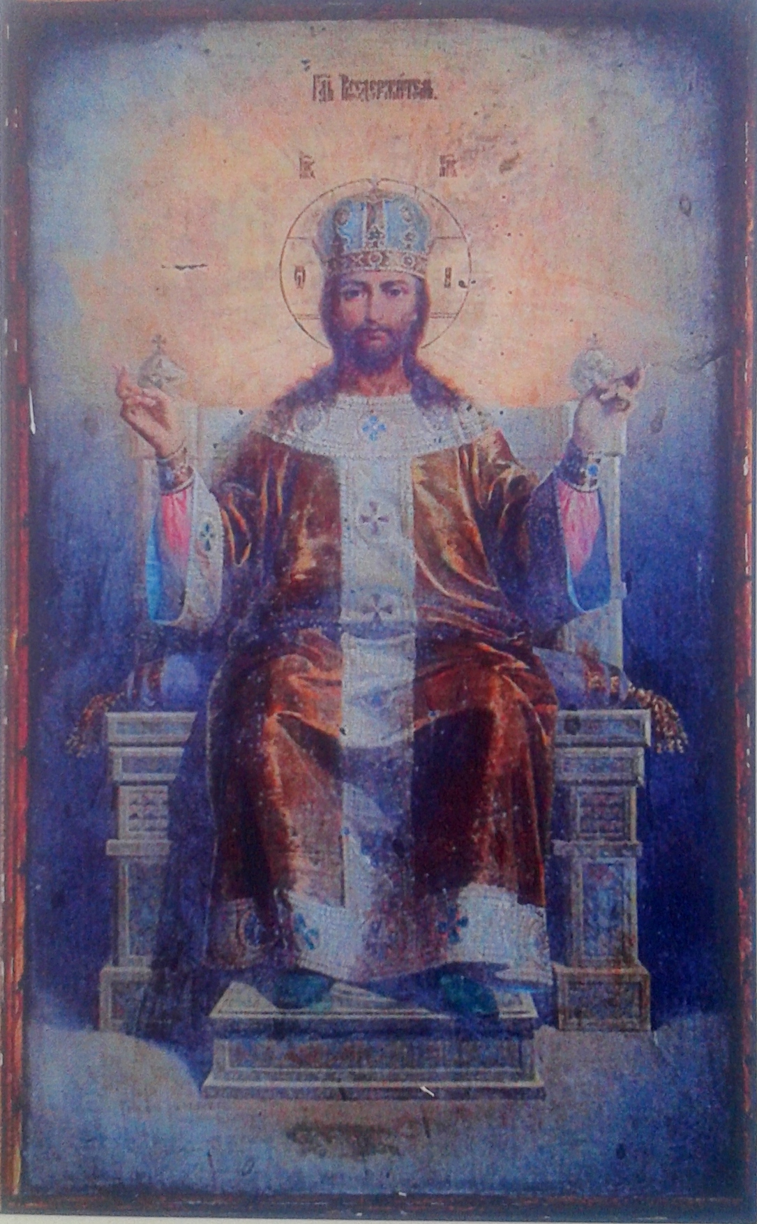 Chrystus Pantokrator, ikona z cerkwi z Sosnowicy